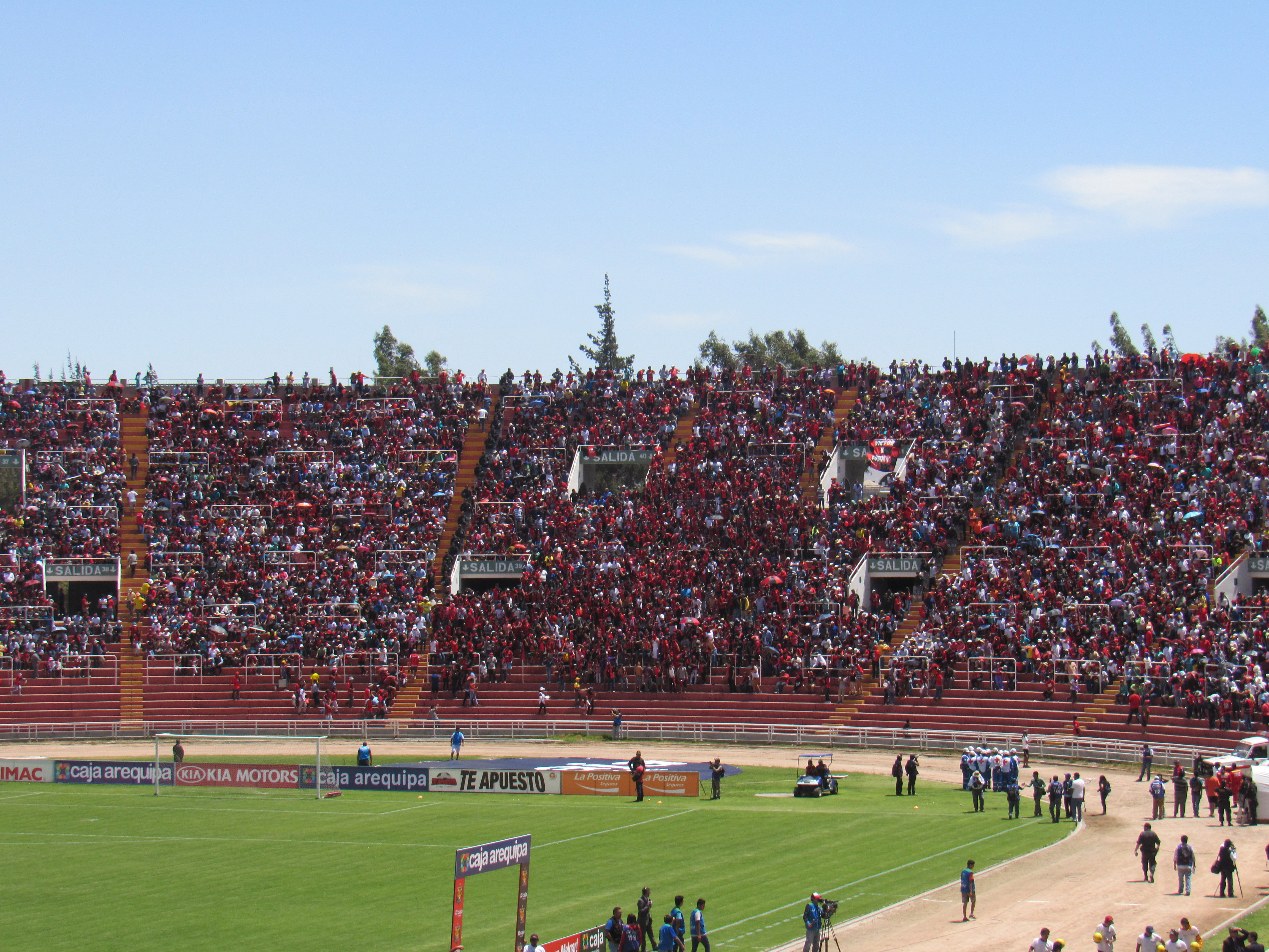 Tribuna Sur del Estadio Monumental de la UNSA. En La Foto se puede apreciar también a la Barra "León del Svr" del FBC Melgar.